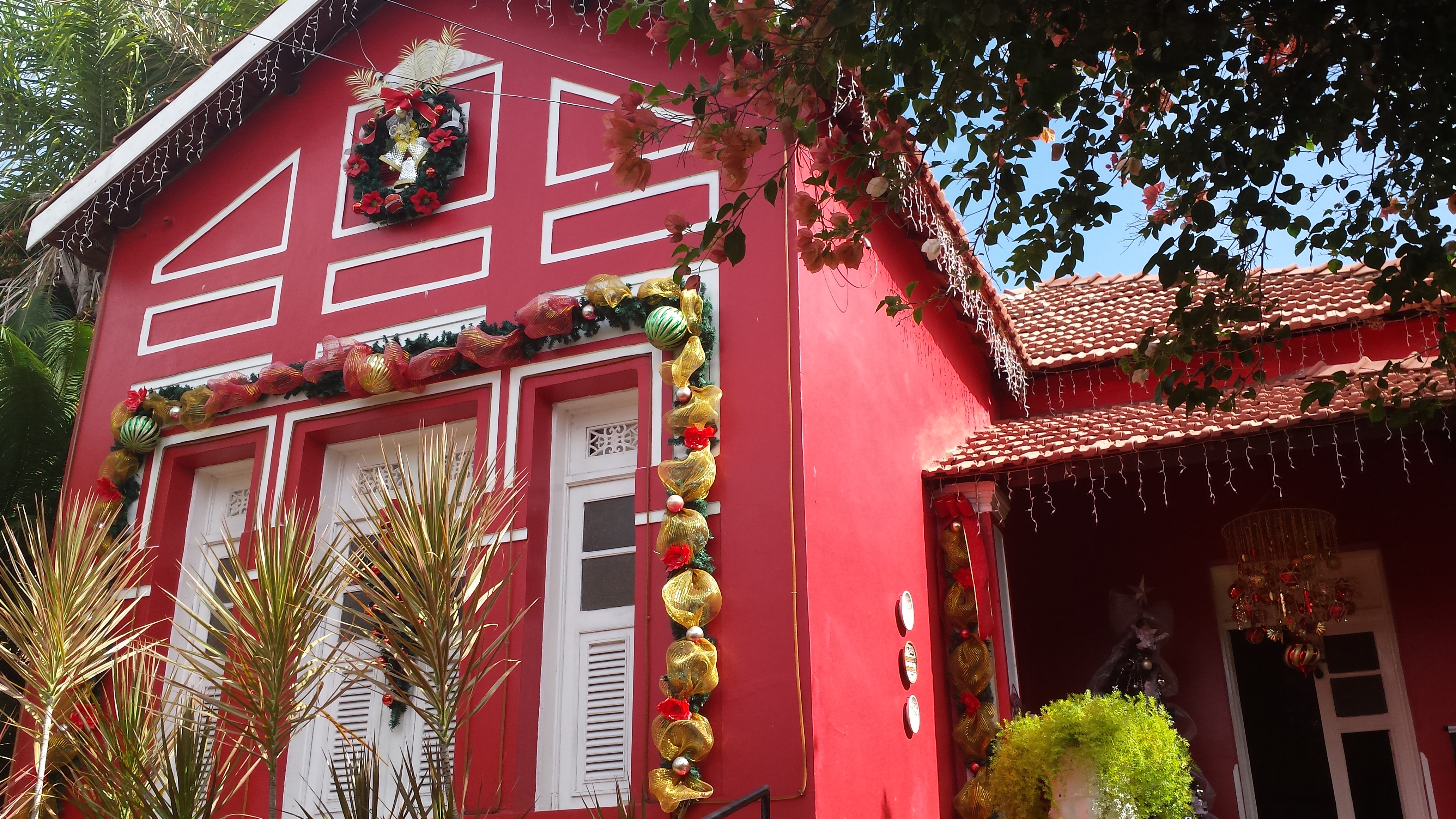 Solar dos Sampaios com decoração de natal